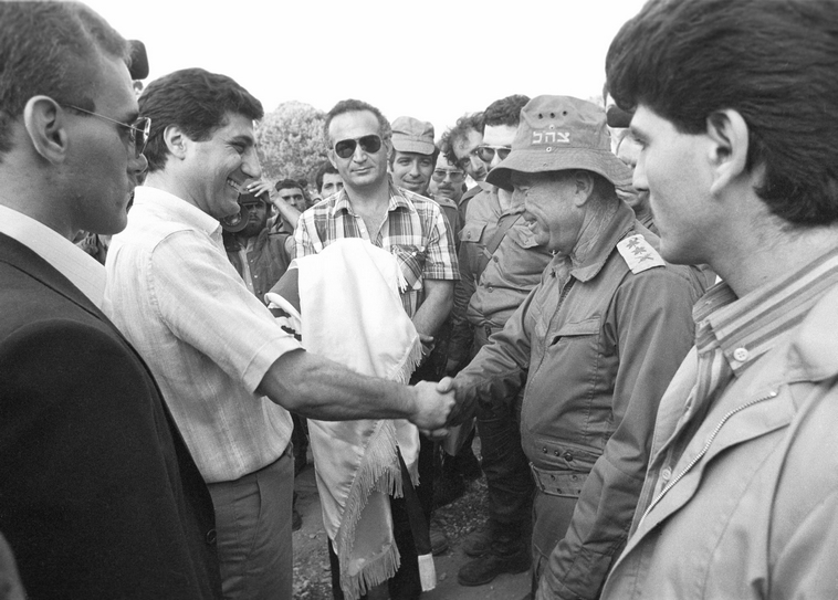 מלחמת-שלום-הגליל, חבירת צה"ל עם הנוצרים. הרמטכ"ל רפאל איתן (מימין) לוחץ יד לבאשיר ג'ומייל (משמאל). מיקום: לבנון. במרכז התמונה בחולצה משובצת - נציג המוסד אבנר אזולאי.